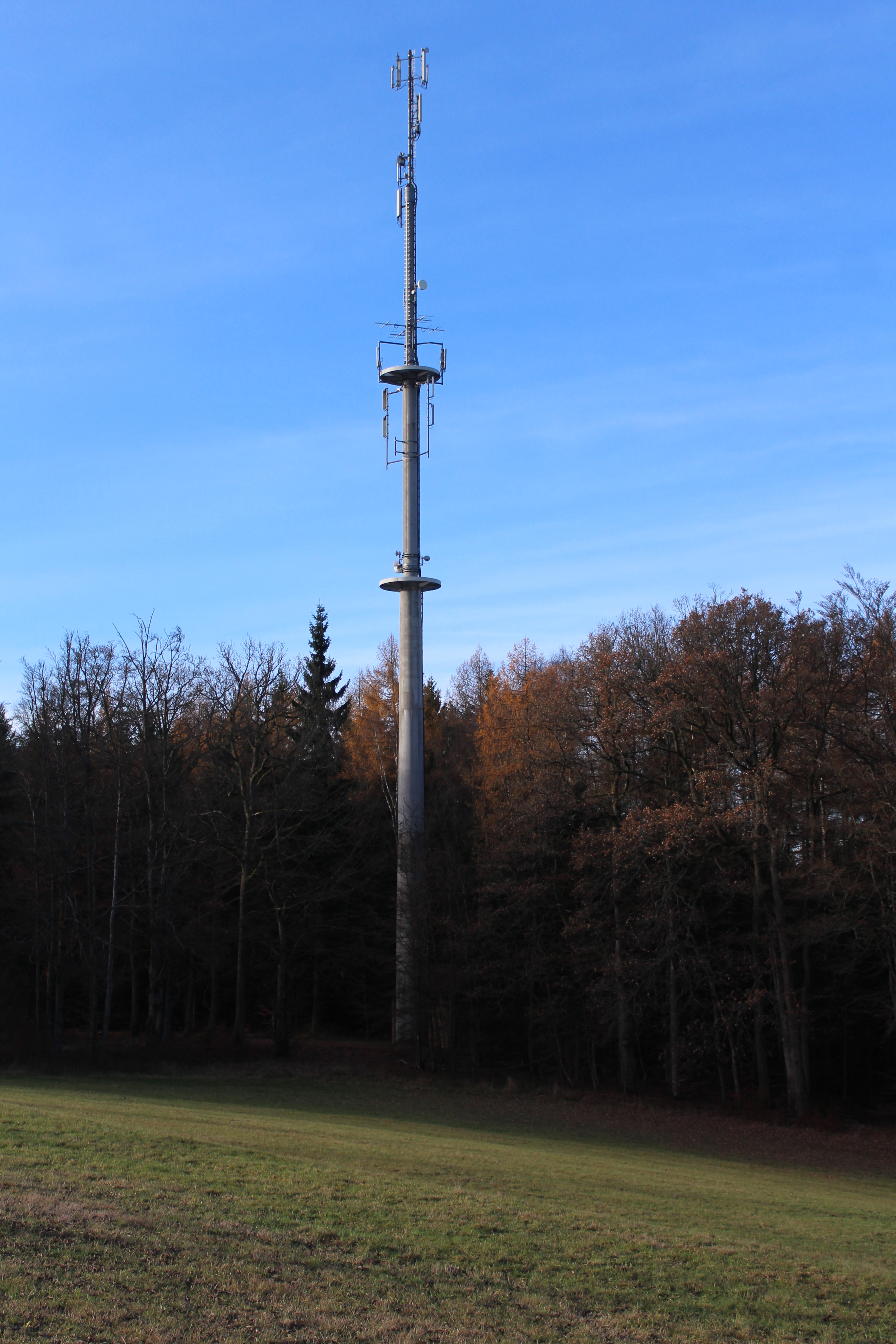 Sendeturm Bad Brückenau ("Brücki")